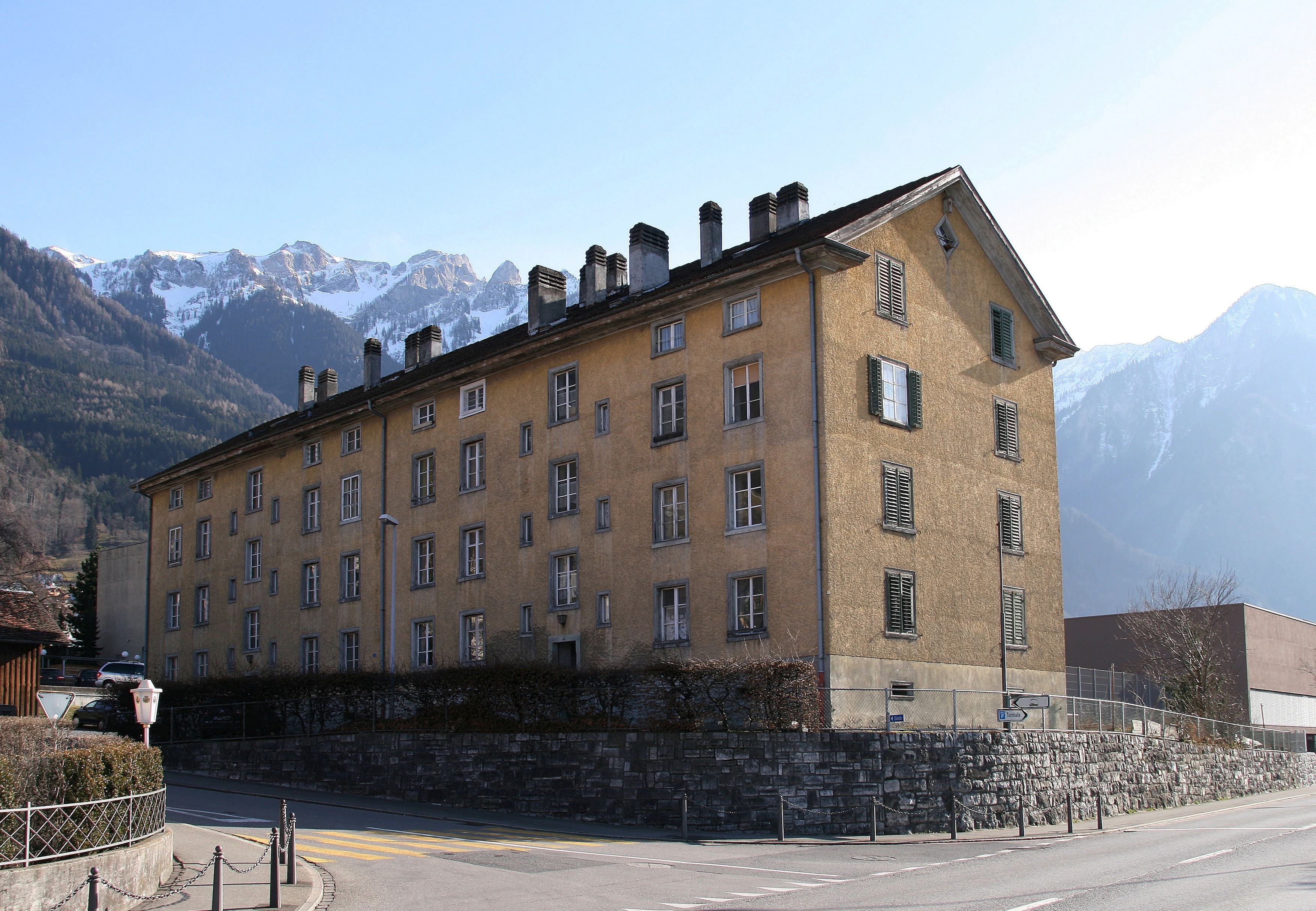 Kosthaus (Arbeiterwohnhaus) von Architekt Hilarius Knobel erbaut vom Baumwollfabrikant Caspar Jenny 1873 in Triesen, Liechtenstein. Derzeit wird geprüft, ob das Gebäude renoviert werden kann.